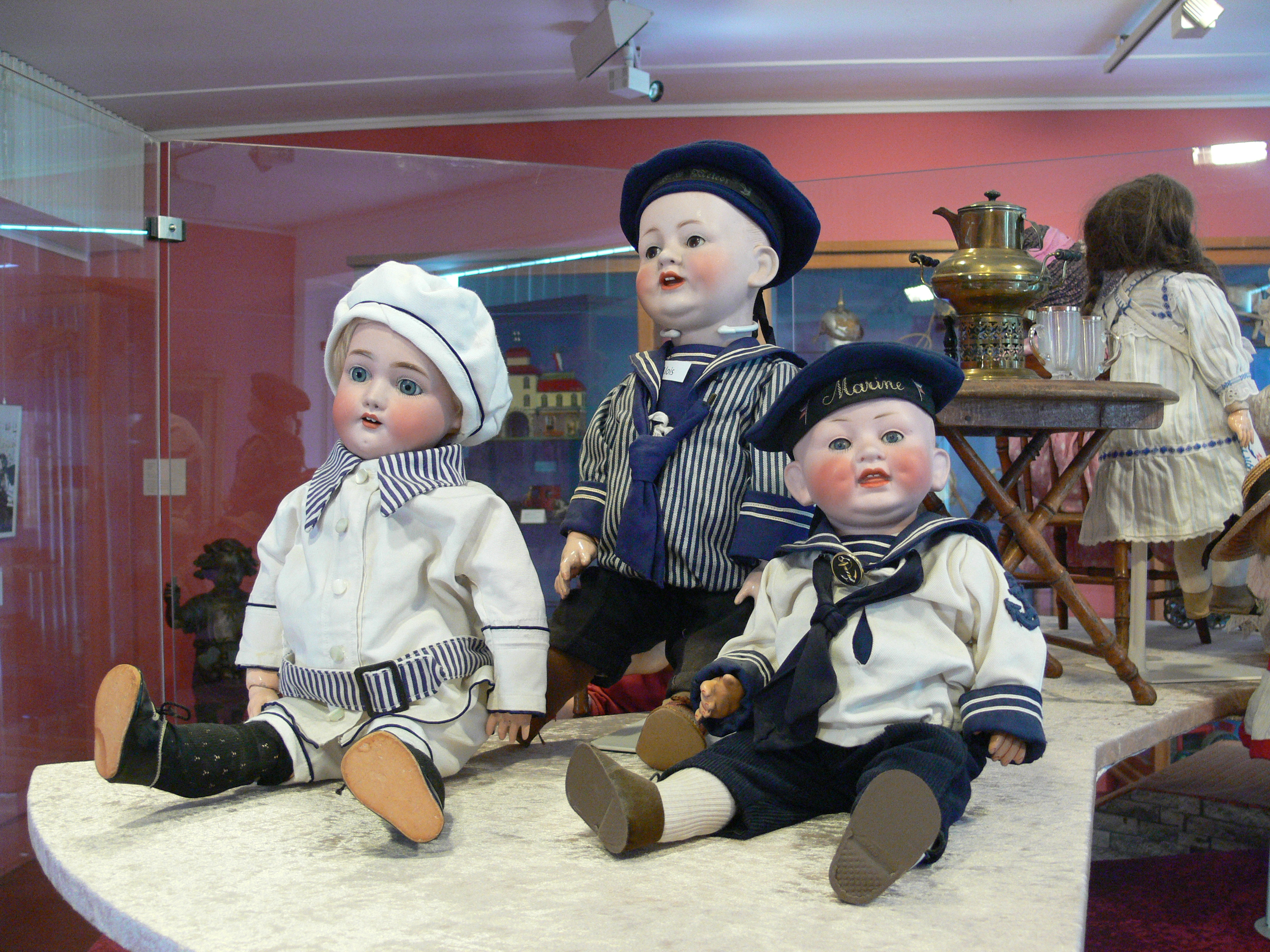 Sammlung Kindheit und Jugend (Stiftung Stadtmuseum Berlin) Puppen (Ende 19./Anfang 20. Jh) mit Matrosenkleidung